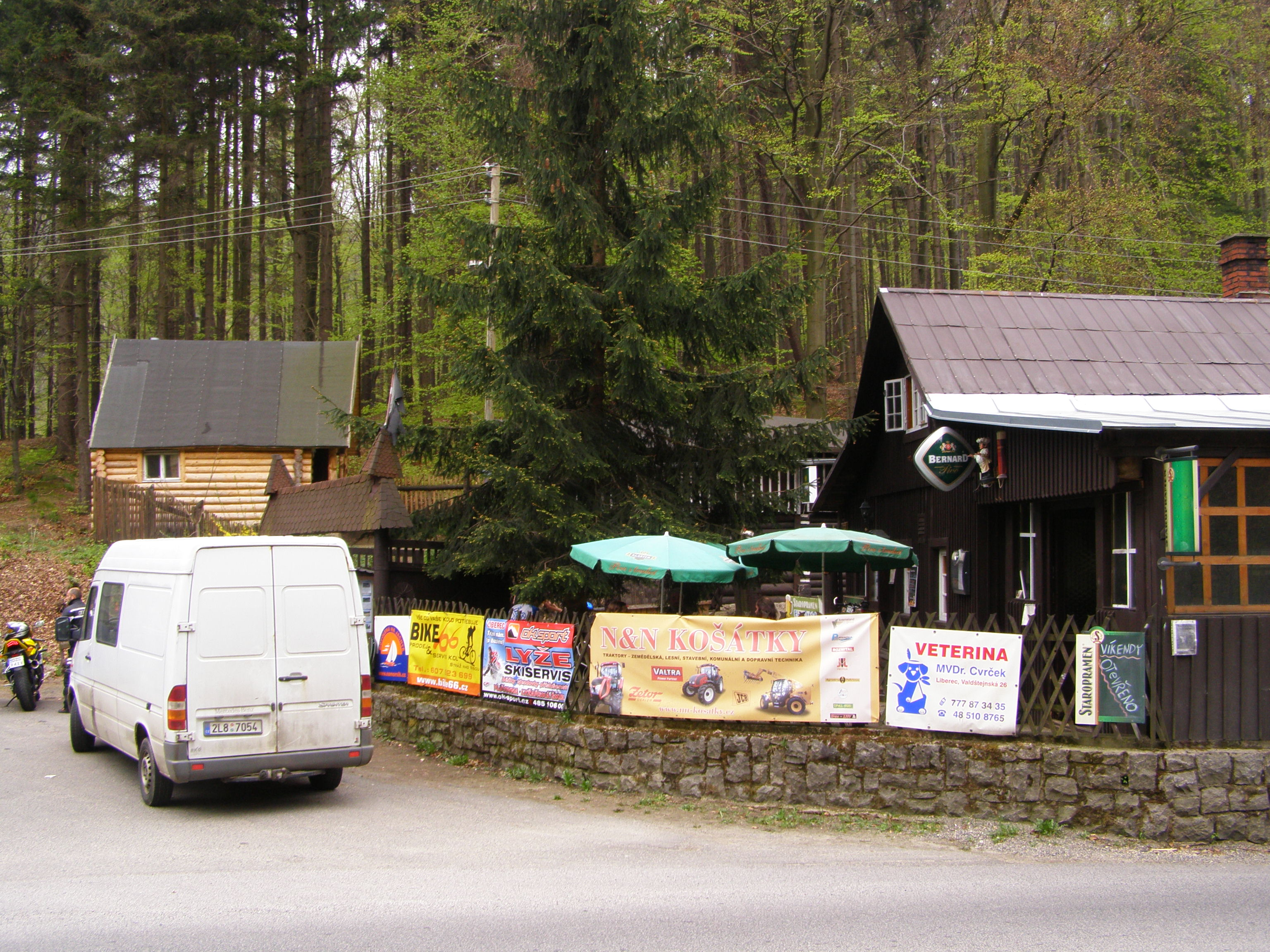 Oldřichovská vrchovina, NPR Jizerskohorské bučiny, kříž v Oldřichovském sedle